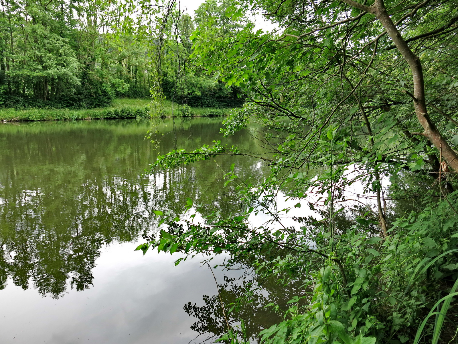 Enz im NSG-Nr. 2.096 „Enztal zwischen Niefern und Mühlacker“, Enzkreis, Baden-Württemberg